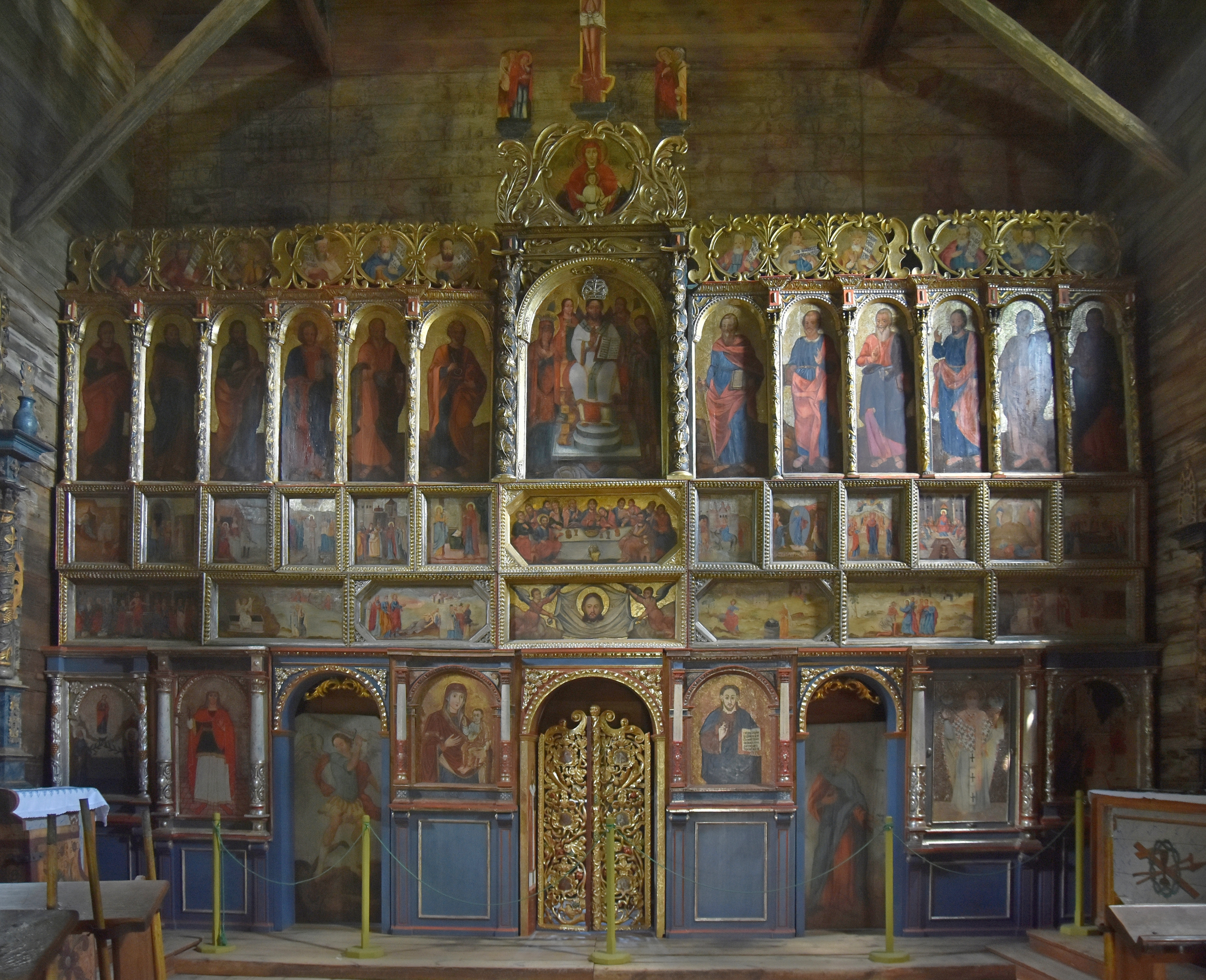 Radruż, Cerkiew św. Paraskewy w Radrużu